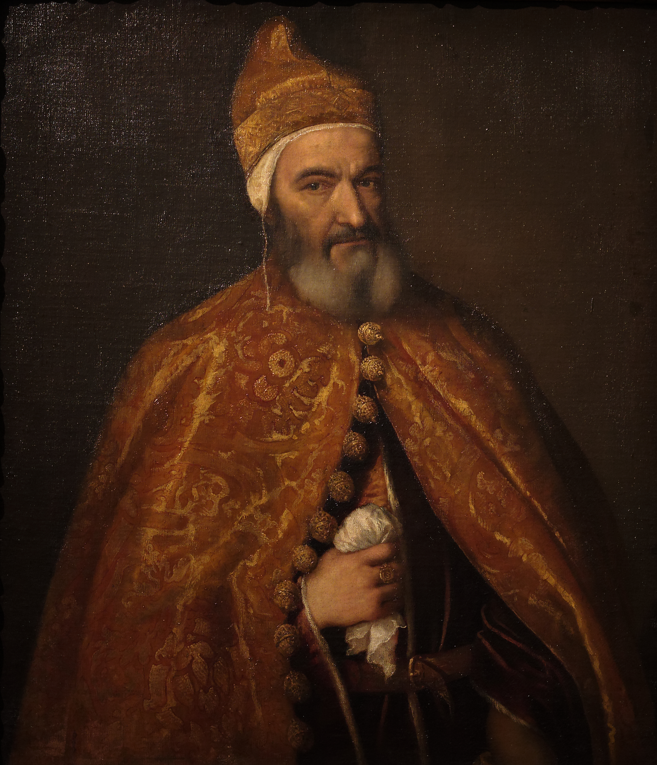 Portrait de Marcantonio Trevisani, Doge de Venise par Tiziano Vecellio (Titien). Musée des beaux-arts de Budapest. Leg János Pálffy 1912. N°4223